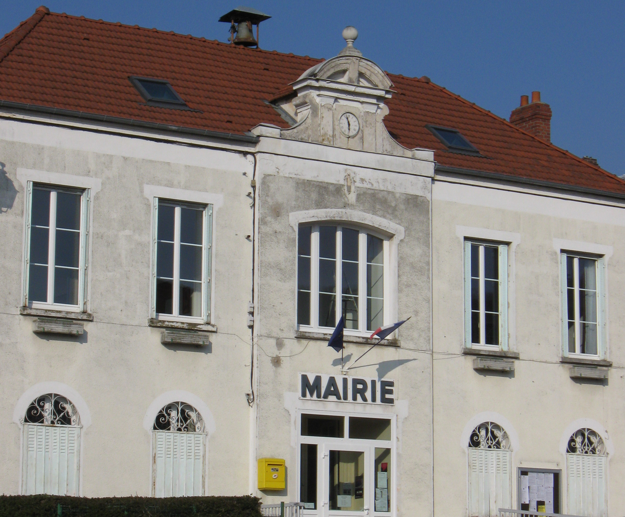 Mairie de Pavant. (département de l'Aisne , région Picardie).